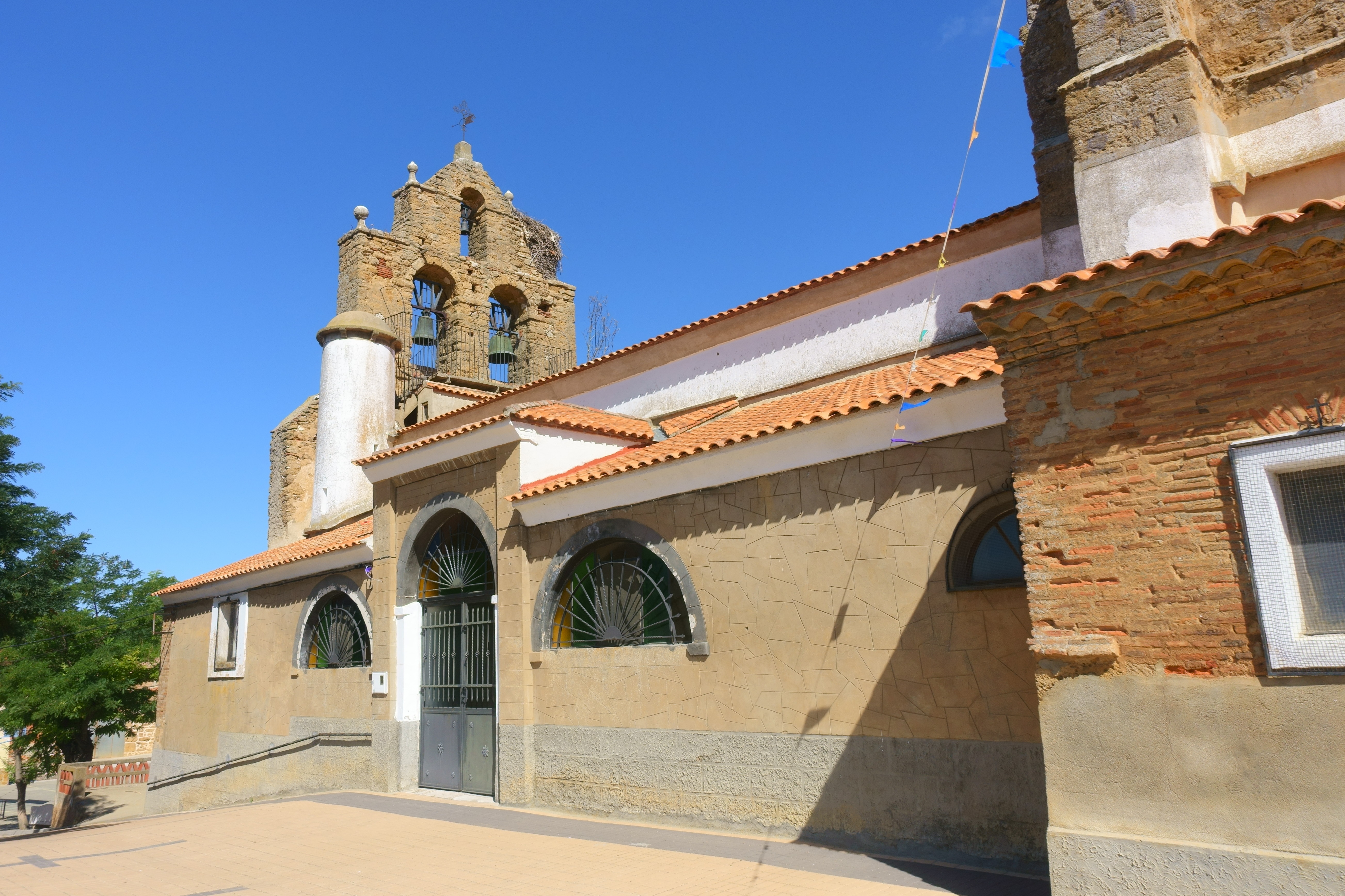 Iglesia de Santa Marina, Prado (Zamora, España).